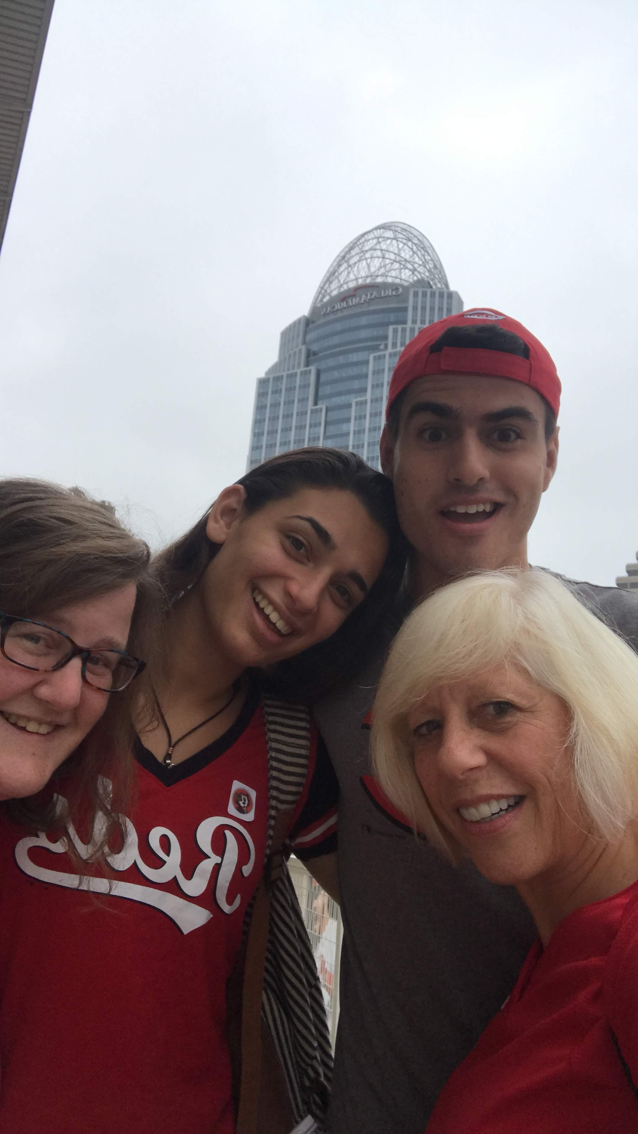 חברים מישראל 2018-2019 אסף מונק ועדי איצקוביץ לצד שרון ספיגל, מנהלת התכנית בעבר וג׳ניפר קלארק, המנהלת הנוכחית.